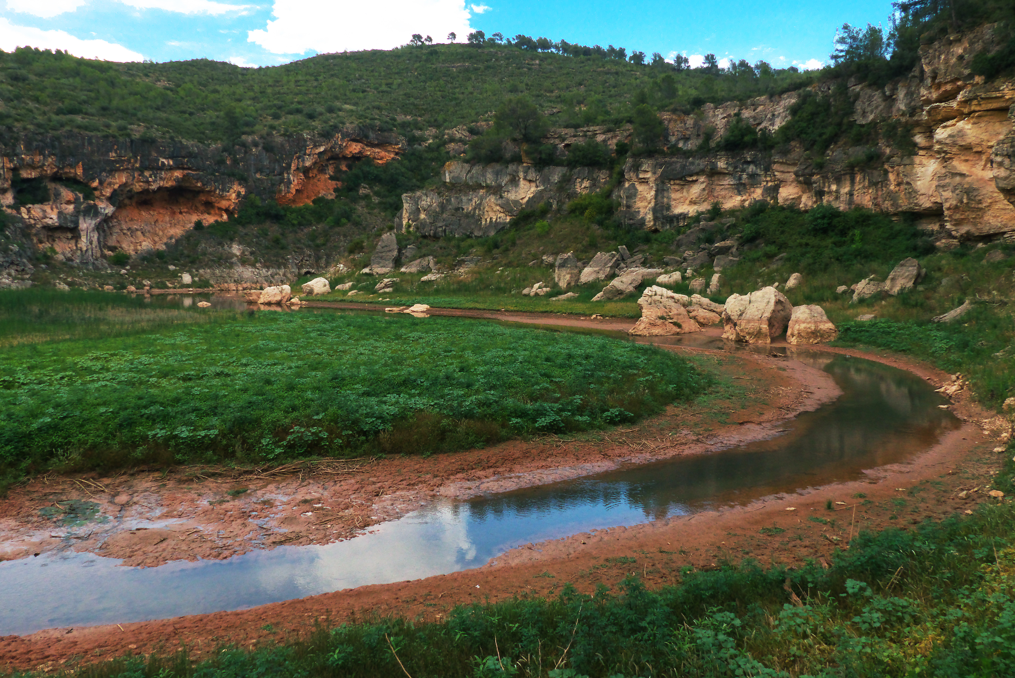 Imatge del Riu Gaià al seu pas per sota de l'Altrera, just abans d'arribar al pantà del catllar. This is a a photo of a natural area in Catalonia, Spain, with id: ES510082